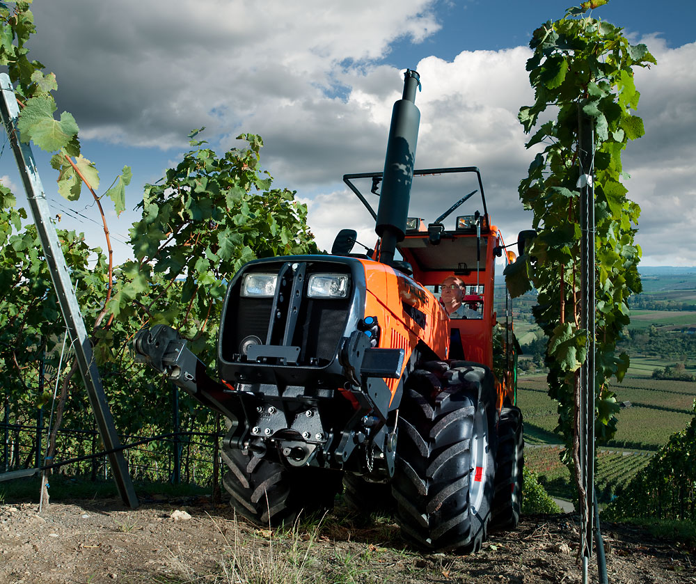 Produktfoto, Holder-Weinbautraktor F 560 im Weinbergeinsatz